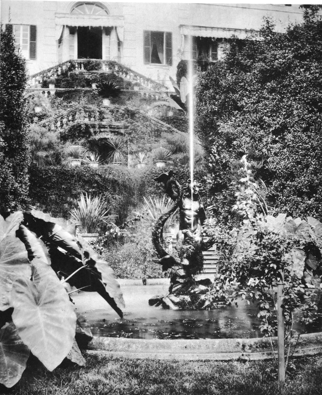 Obrázek z knihy The art of garden design in Italy od Henry Inigo Triggse.